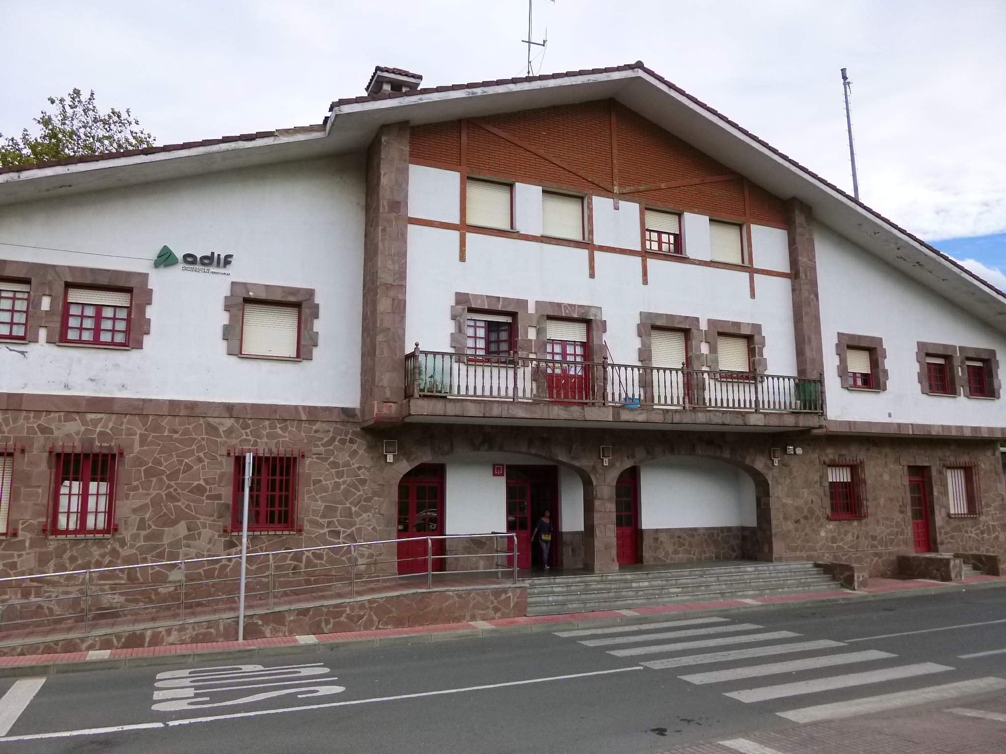 Muskiz - Estación de Adif